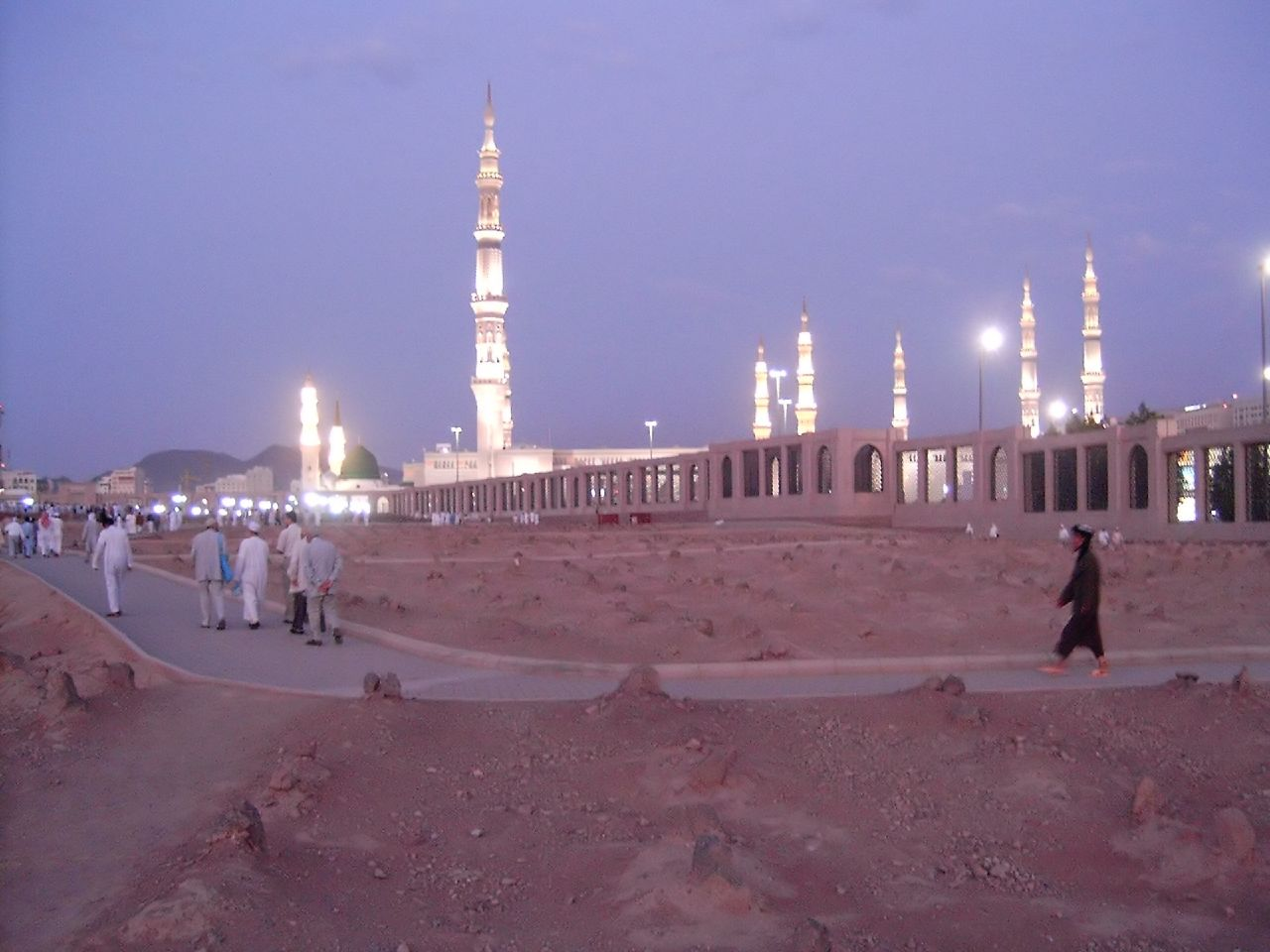 Medina, Saudi Arabia, at night.